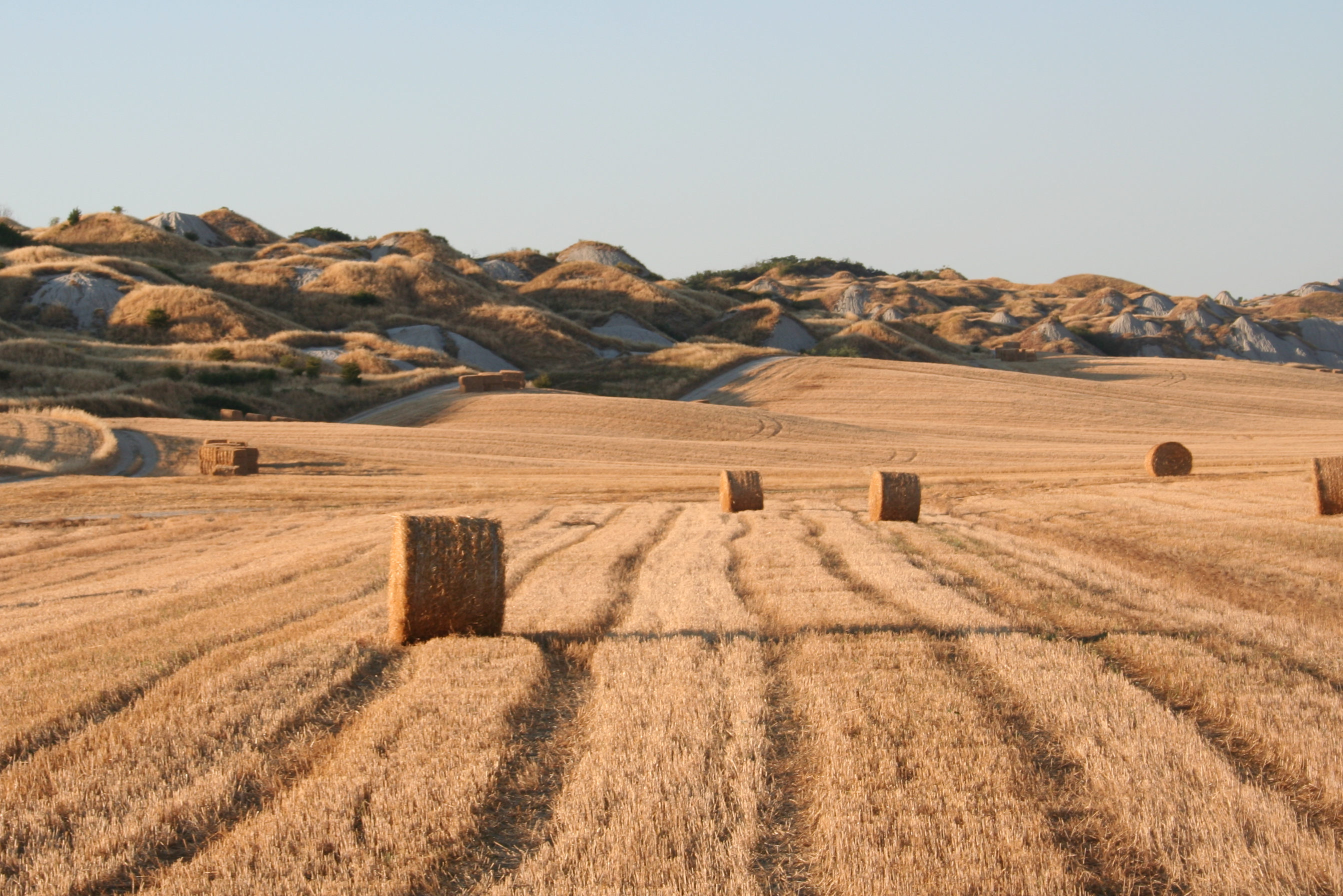 Crete senesi - Foin